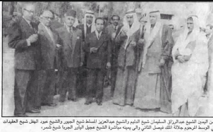 ملك العراق فيصل الثاني مع شيوخ القبائل